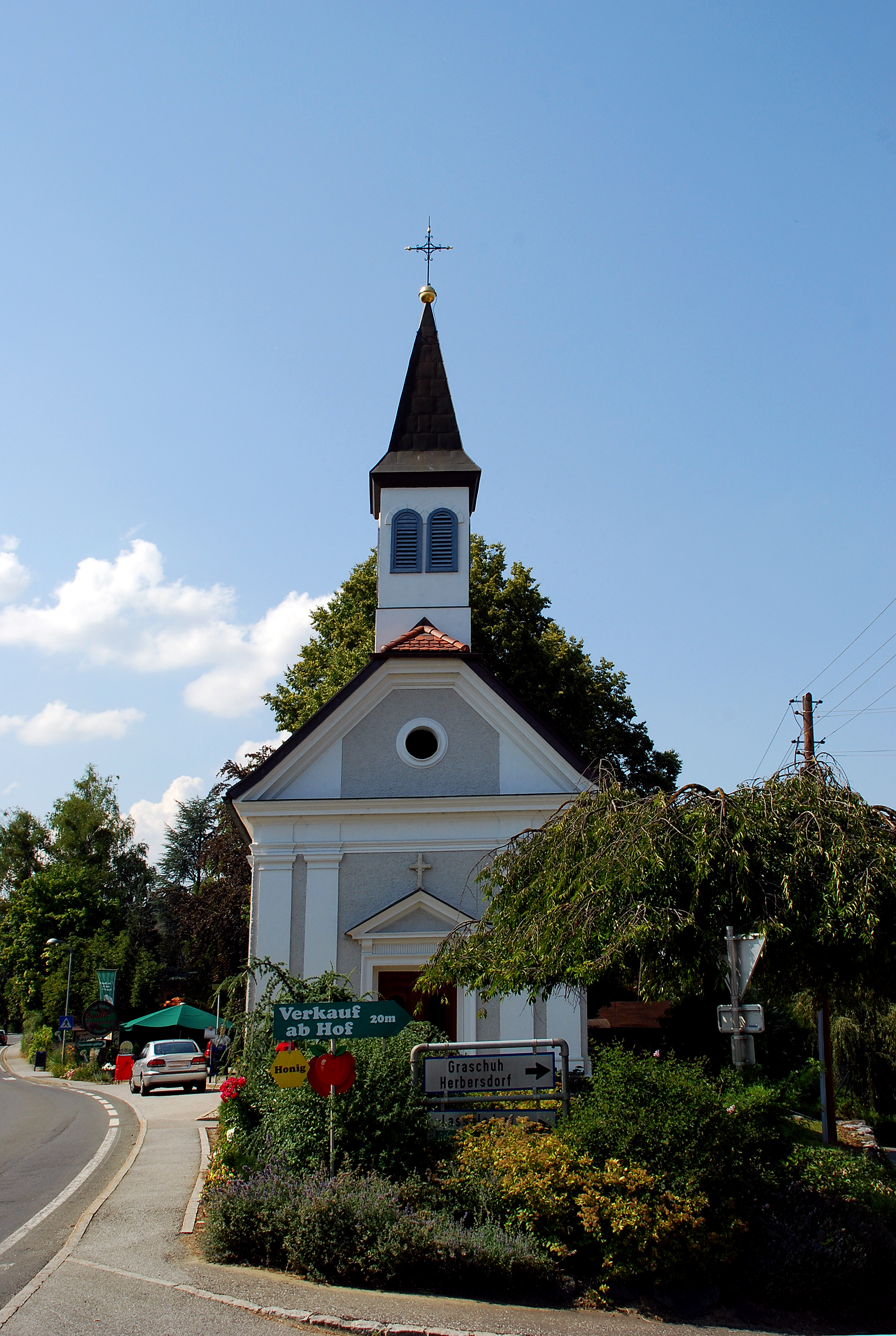 Rassach, Steiermark, Österreich: Köck-Kapelle